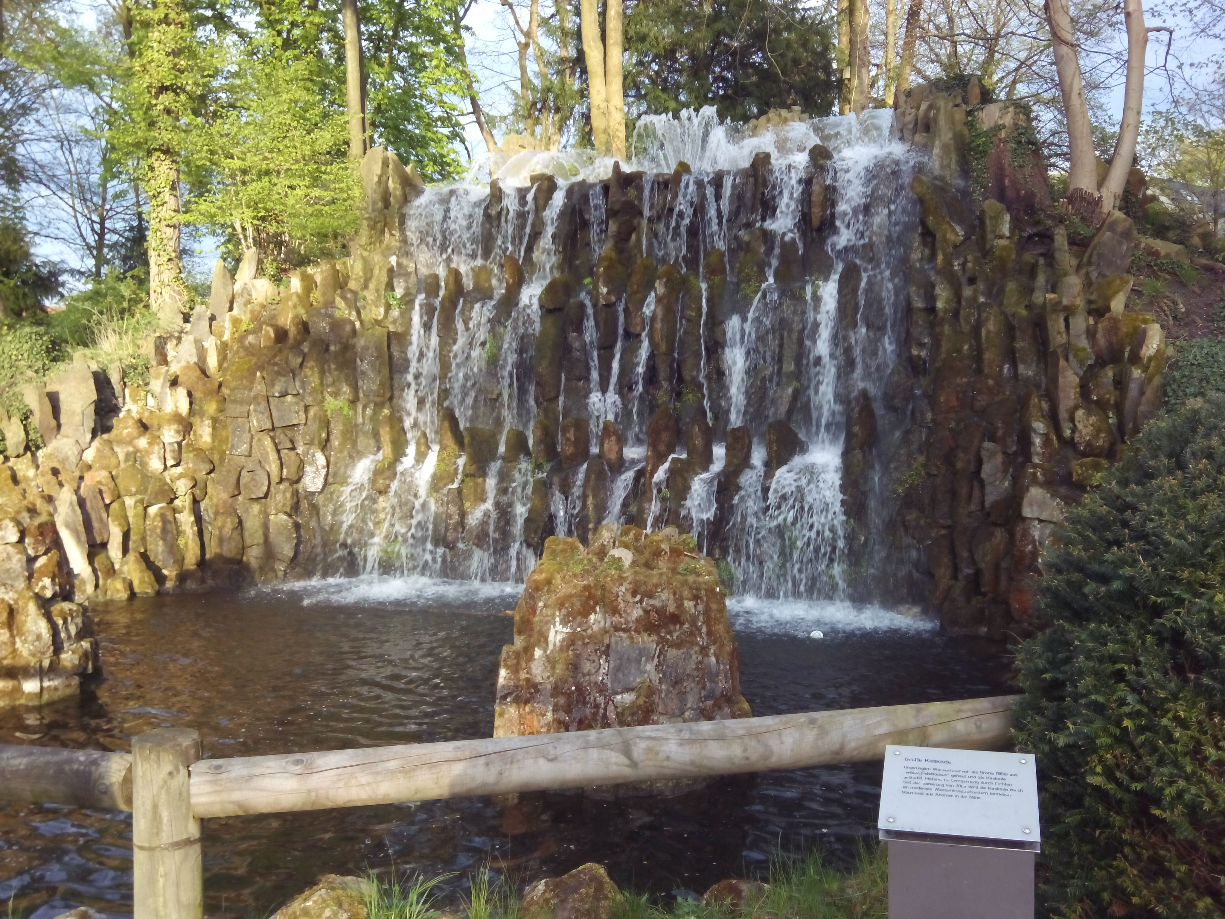 Die Große Kaskade im Palaisgarten Detmold. Aus der Informationstafel: "Ursprünglich Wasserreservoir (1856) aus ‚wilden Felsblöcken‘ gebaut und als Kaskade gestaltet. Historische Umrahmung durch Fichten. Seit der Sanierung von 2009 wird die Kaskade durch ein modernes Wasserkreislaufsystem betrieben. Baumsaal aus Ahornen in der Nähe."